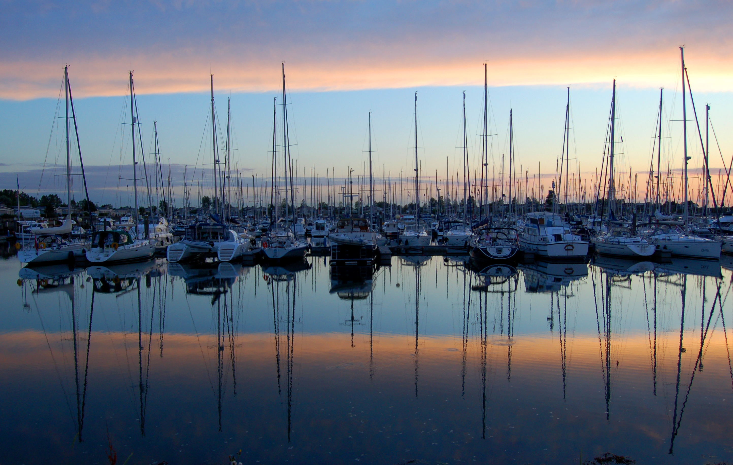 Boats moored at Kamperland